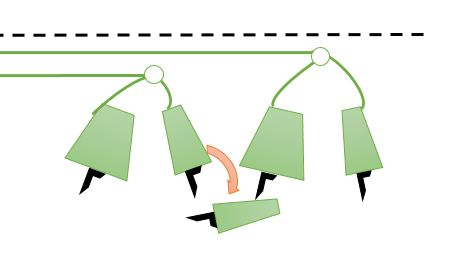 وهو منصب توضع عليه الكونات في عملية التسدية